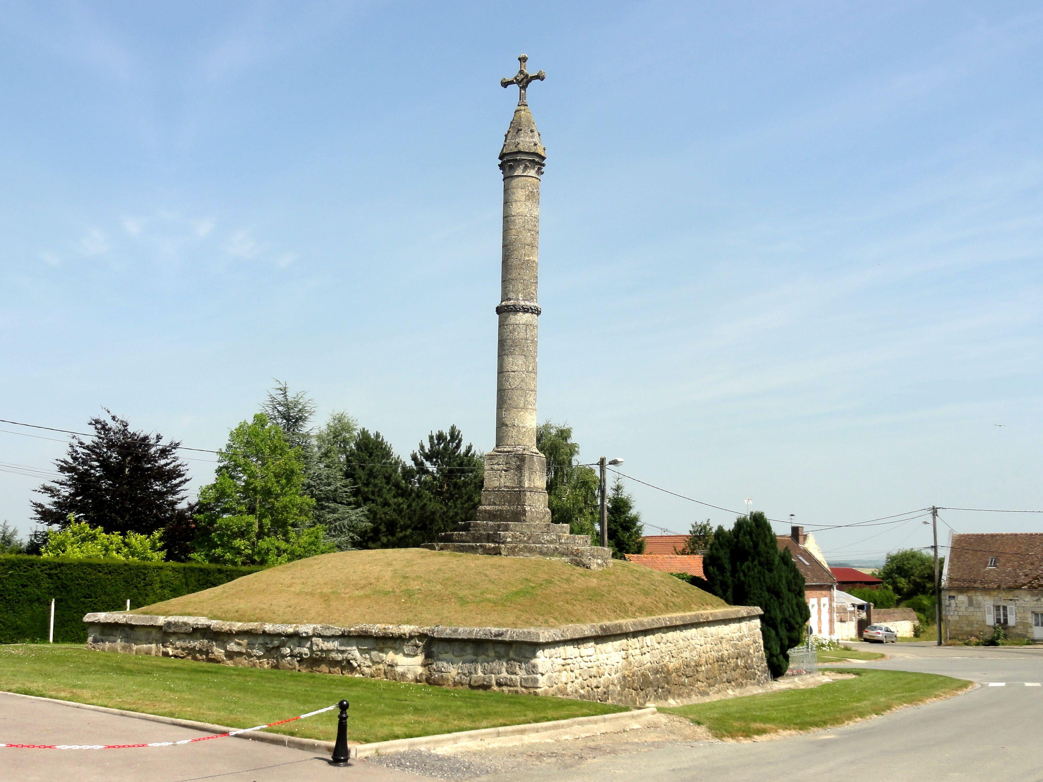 Le calvaire sur la place du village, devant la mairie.